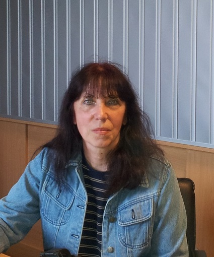 Мария Ганева